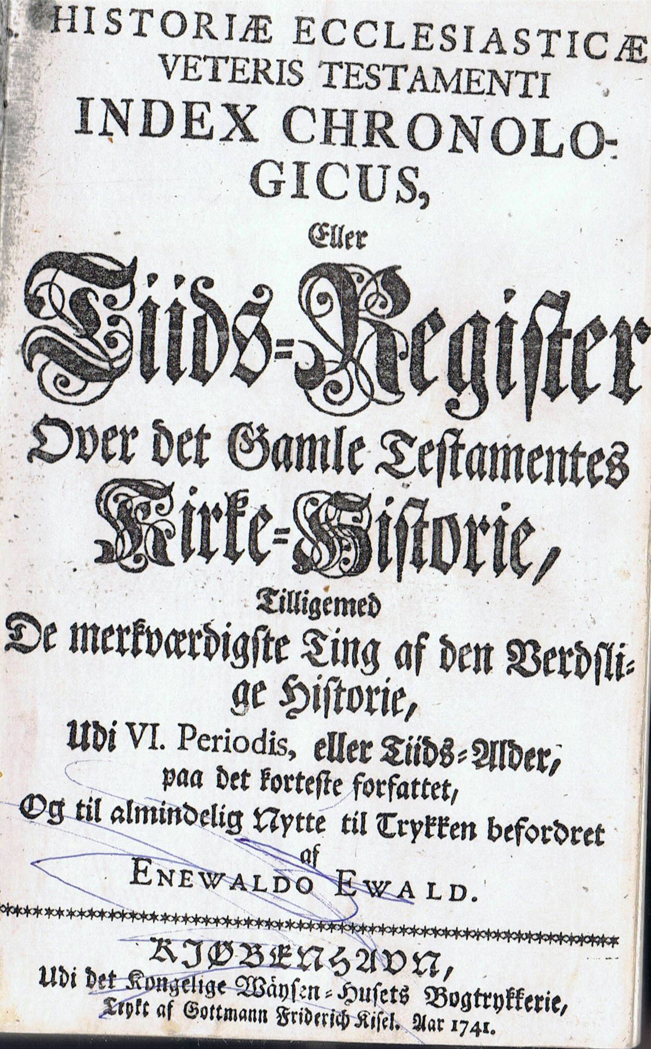 Enevold ewalds tidsregister